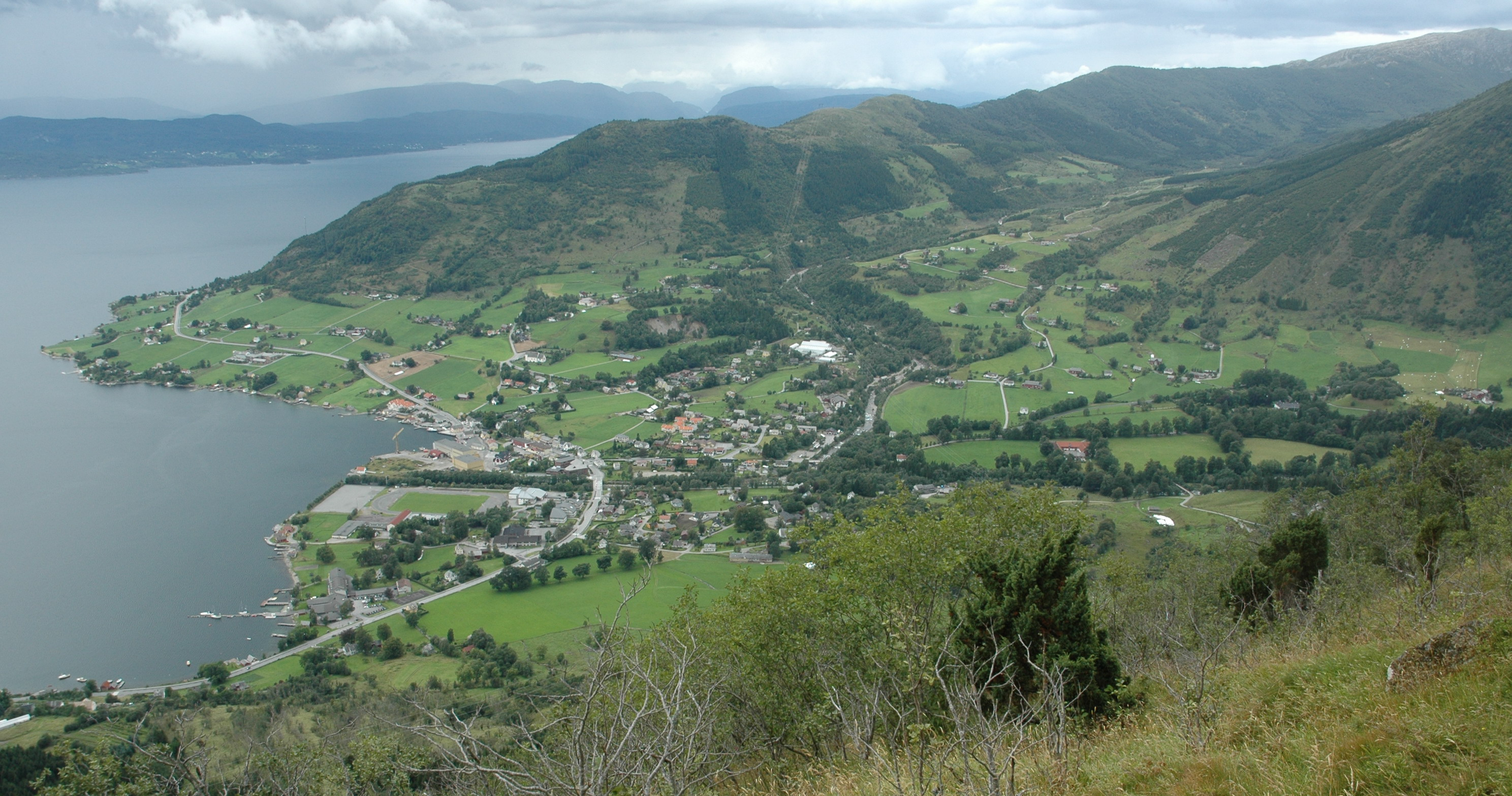 Rosendal, Norway. My own photo, Kjetil Lenes